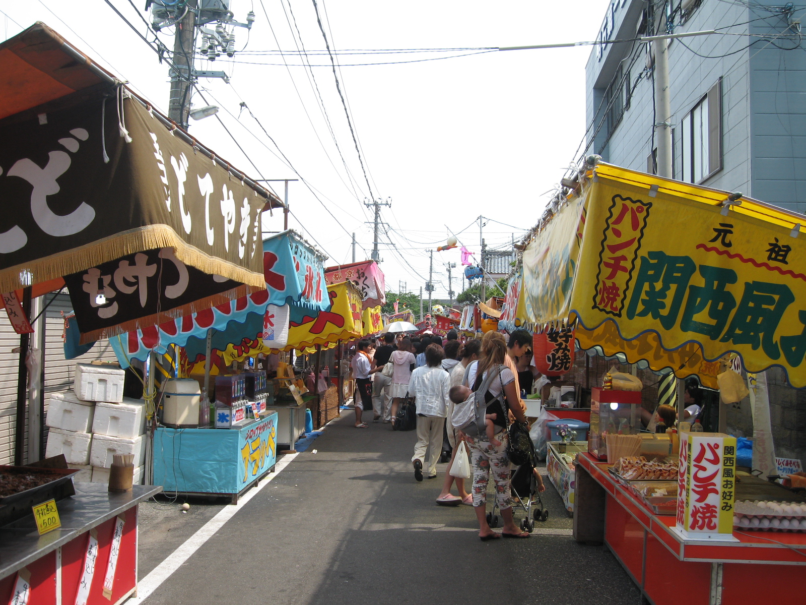 新潟市中央区。蒲原まつりの露店の様子。